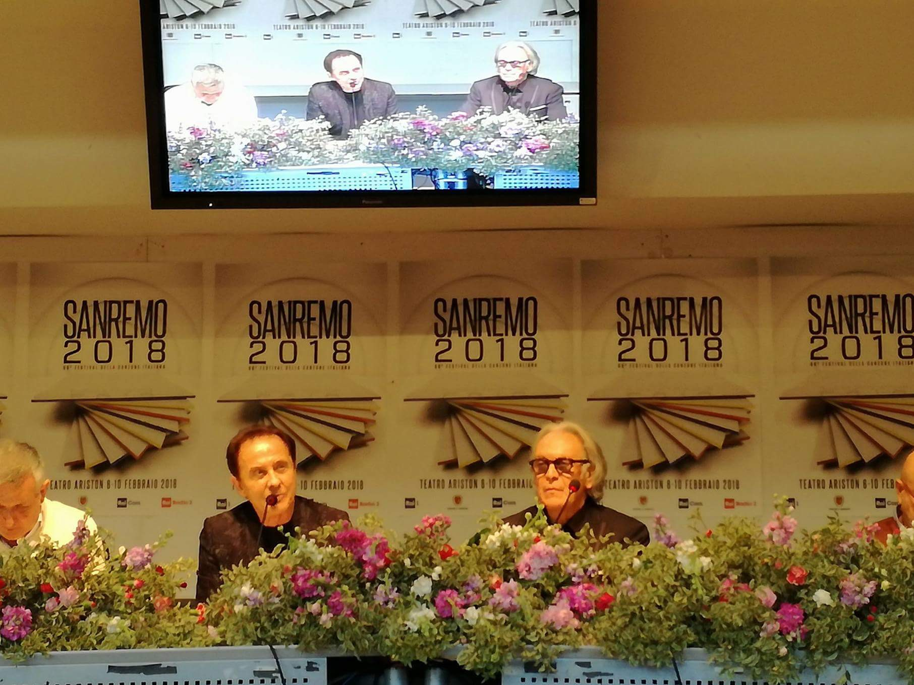 Roby Facchinetti e Riccardo Foglie a Sanremo 2018